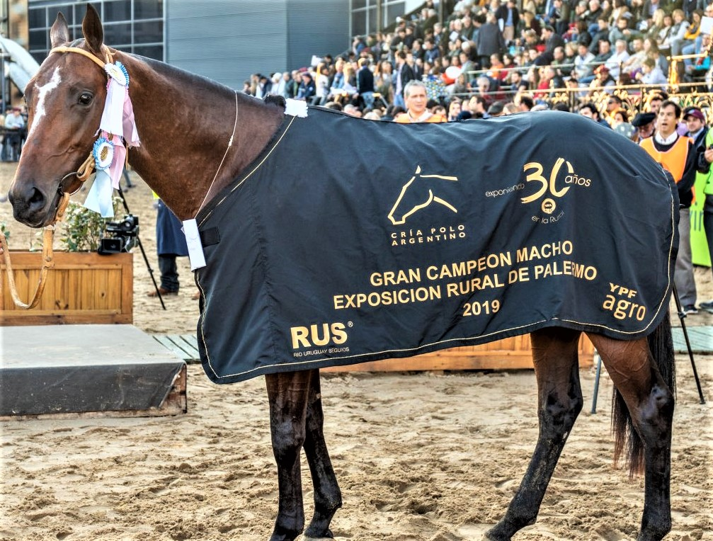 Campeon de la rural macho de raza polo argentino